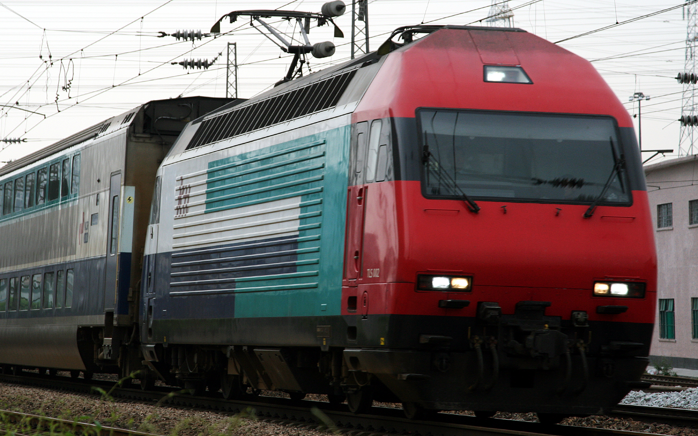 九广通列车于广深铁路